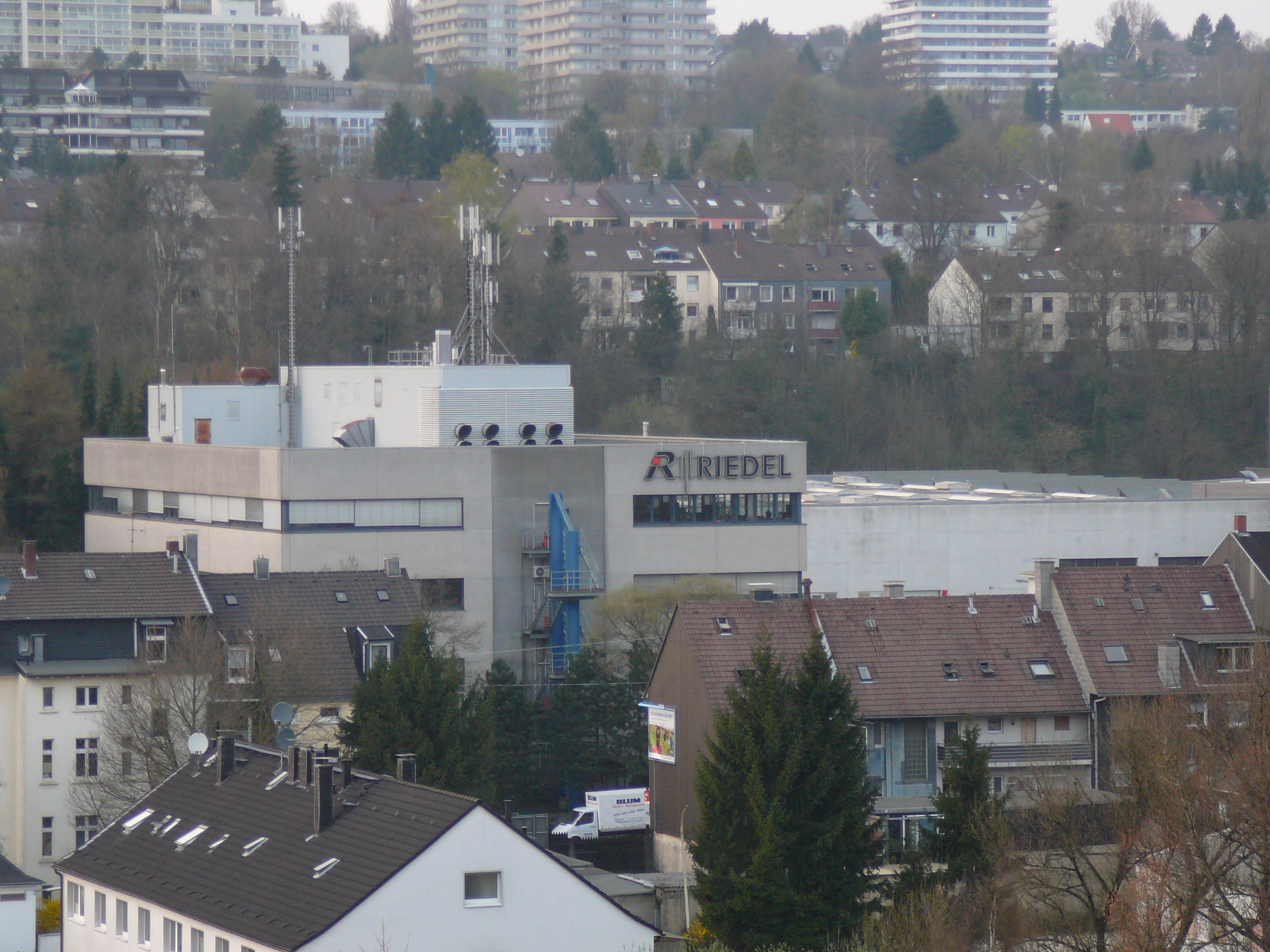 Am Weinberg, Wuppertal